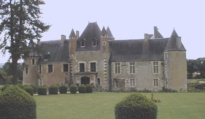 Château de Boucard ; Le Noyer, Cher, France.